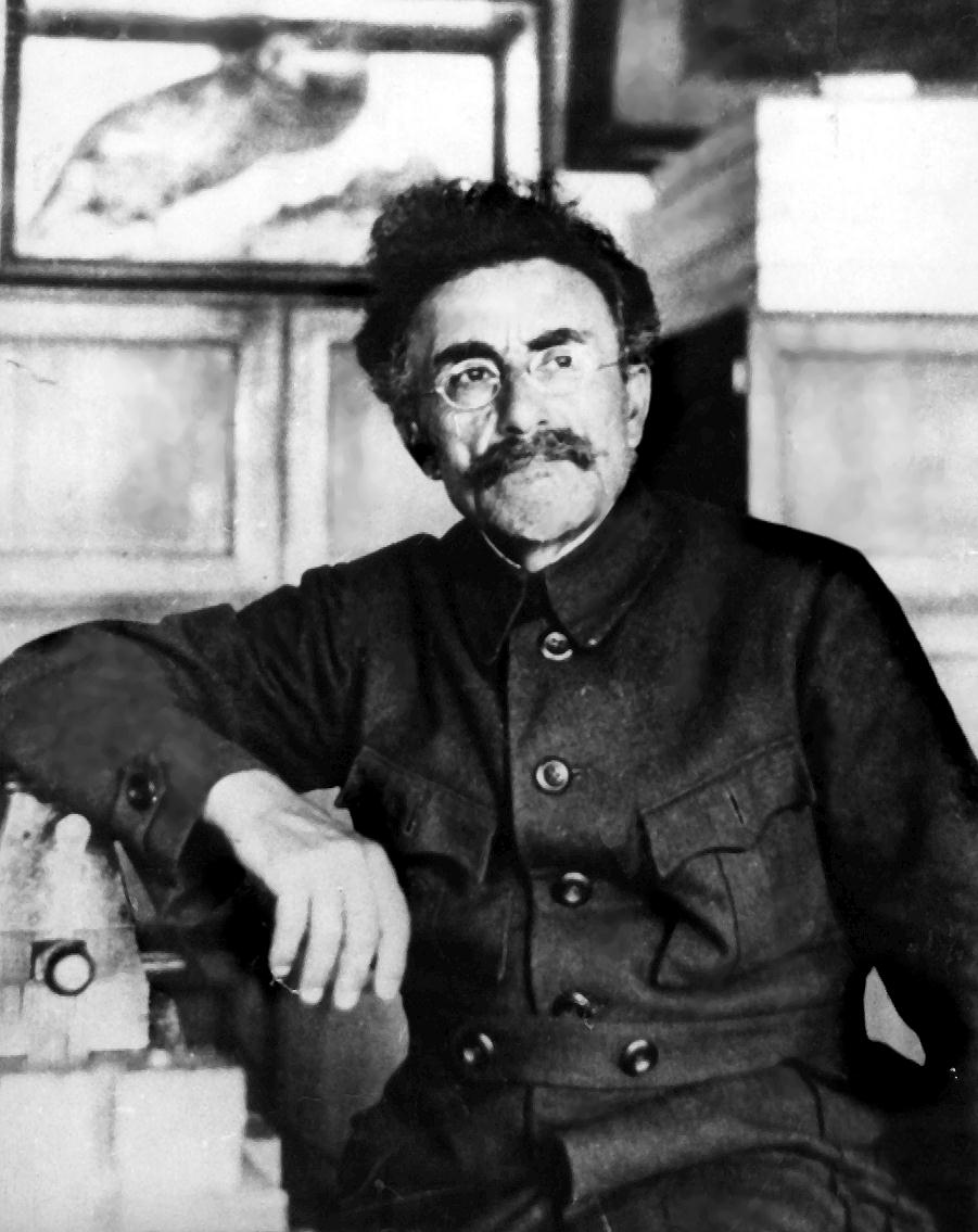 Христофор Георгиевич Шапошников, основатель Кавказского заповедника